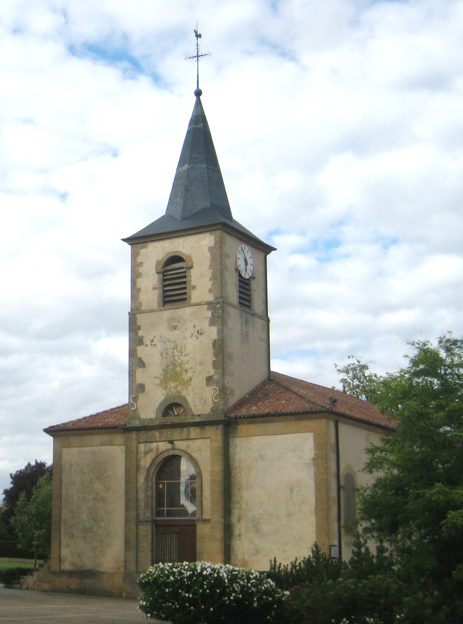 eglise Labry